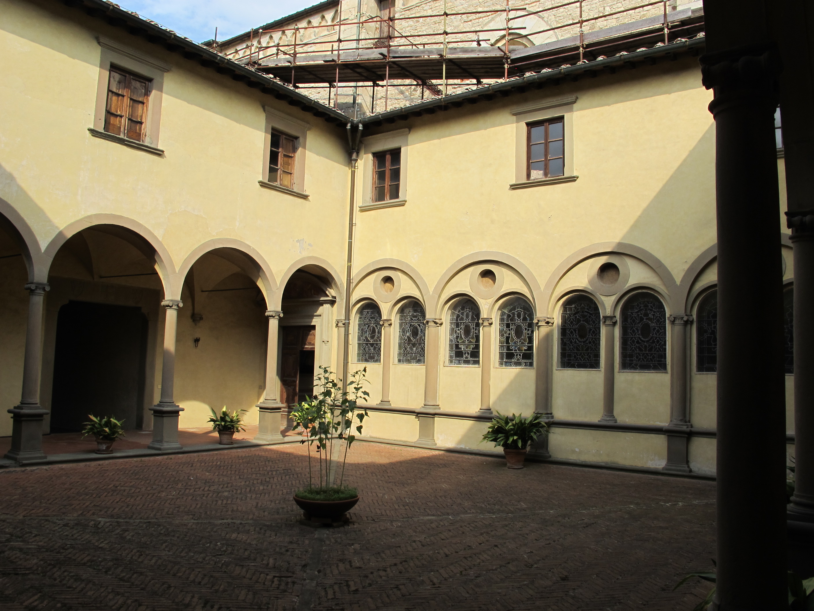 Certosa di fi, chiostrino dei Monaci